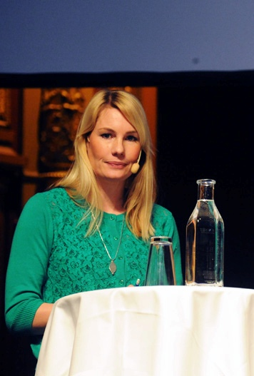 Hanna Marklund och Anna Brolin